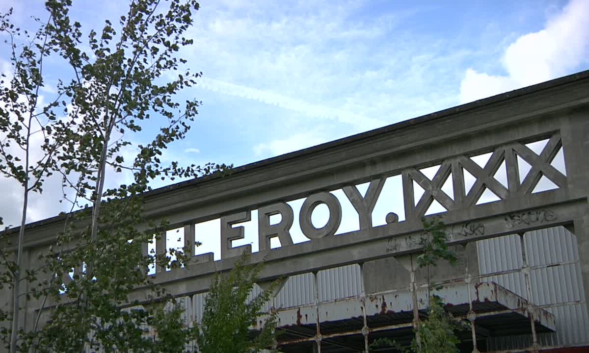 Vue sur l'ancienne enseigne des usines Leroy, à Saint-Fargeau-Ponthierry. .